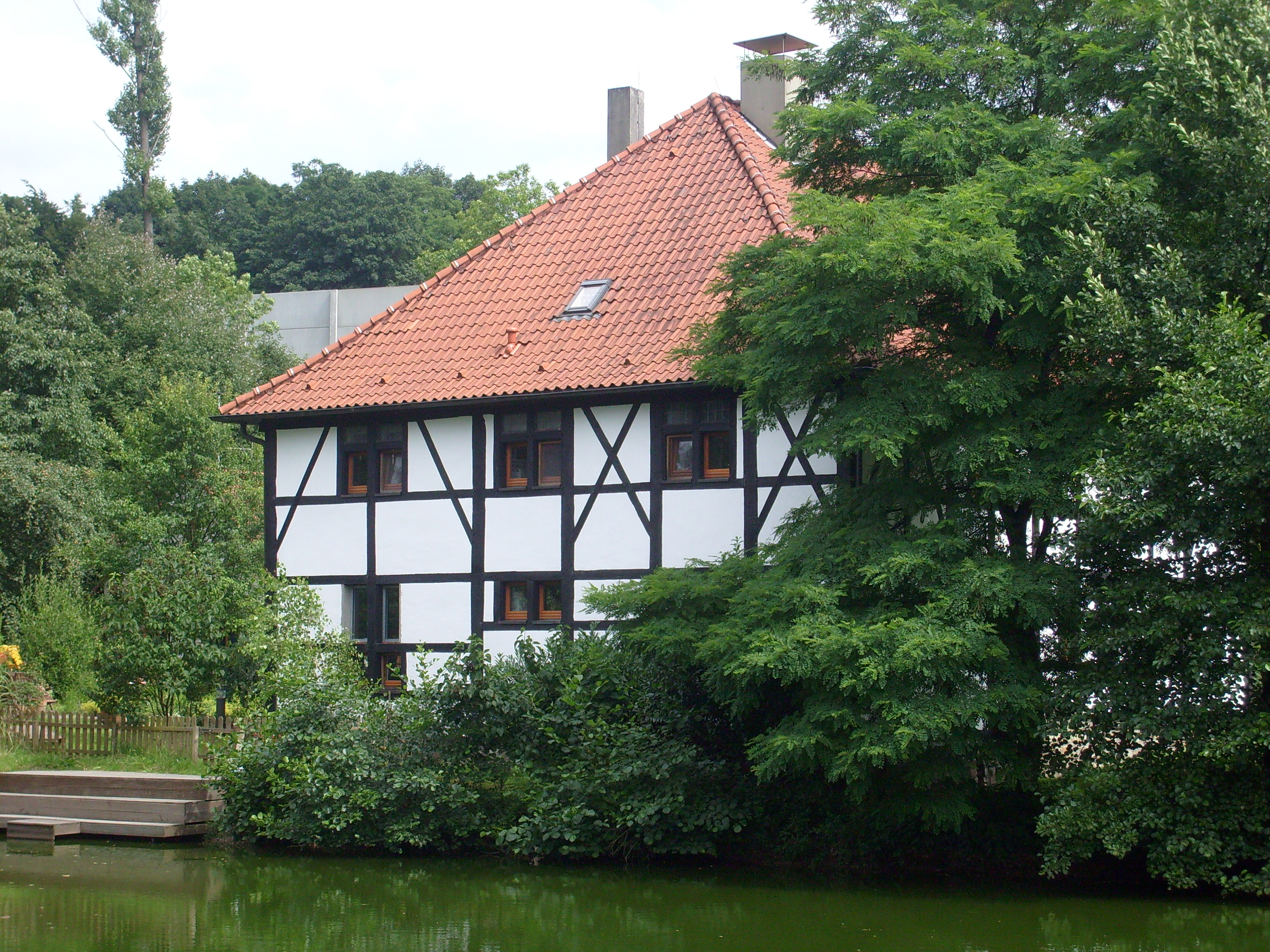 Bauernhaus Bolthausen 4 in Wuppertal-Vohwinkel. Das Haus wurde in der 2. Hälfte des 16. Jahrhunderts erbaut und steht unter Denkmalschutz. (Es handelt sich nicht um Gut Bolthausen.) Der Bach "Kleine Düssel" entspringt in der Nähe des Hauses Bolthauses 4, durchfließt den Teich und mündet bei Gruiten in die "Düssel".